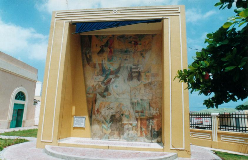 Mural de Alejandro Obregón